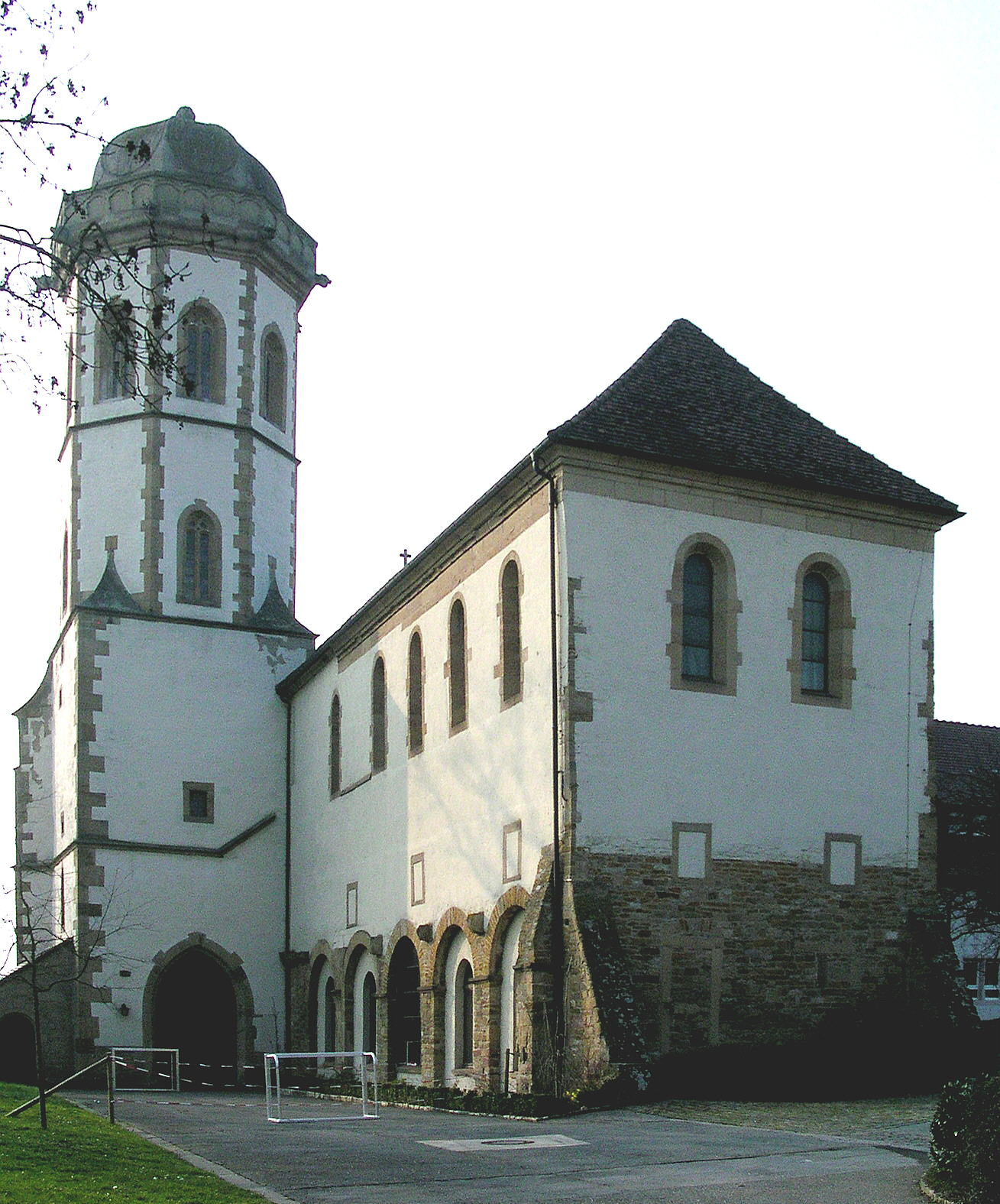 Sinsheim. Kirche von Stift Sunnisheim